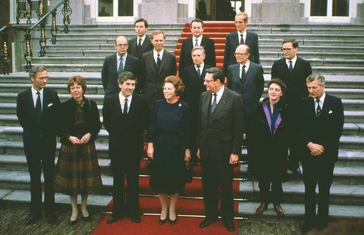 De bordesscène van het kabinet-Lubbers I bij Huis ten Bosch op 4 november 1982